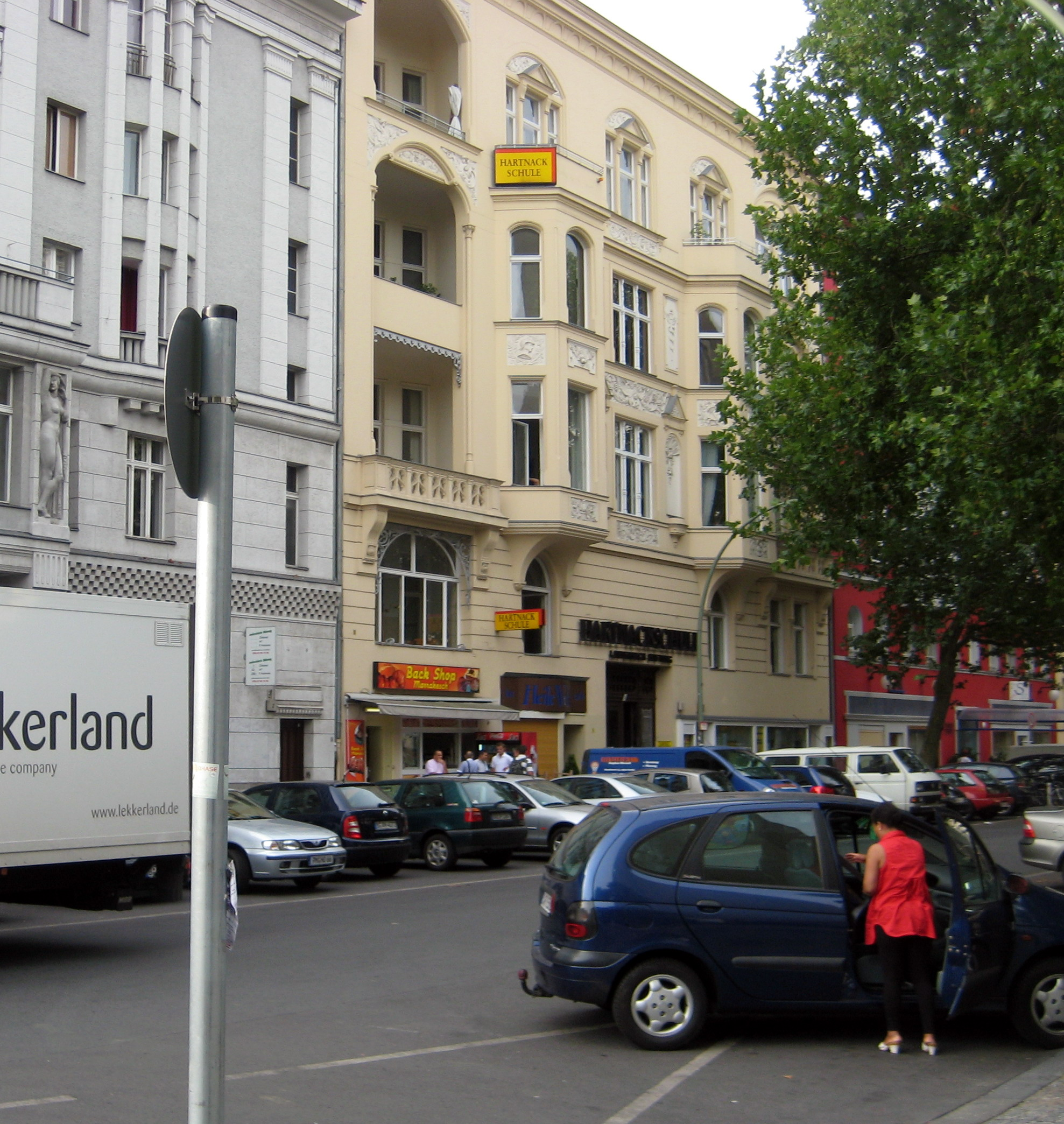 Hartnackschule Berlin